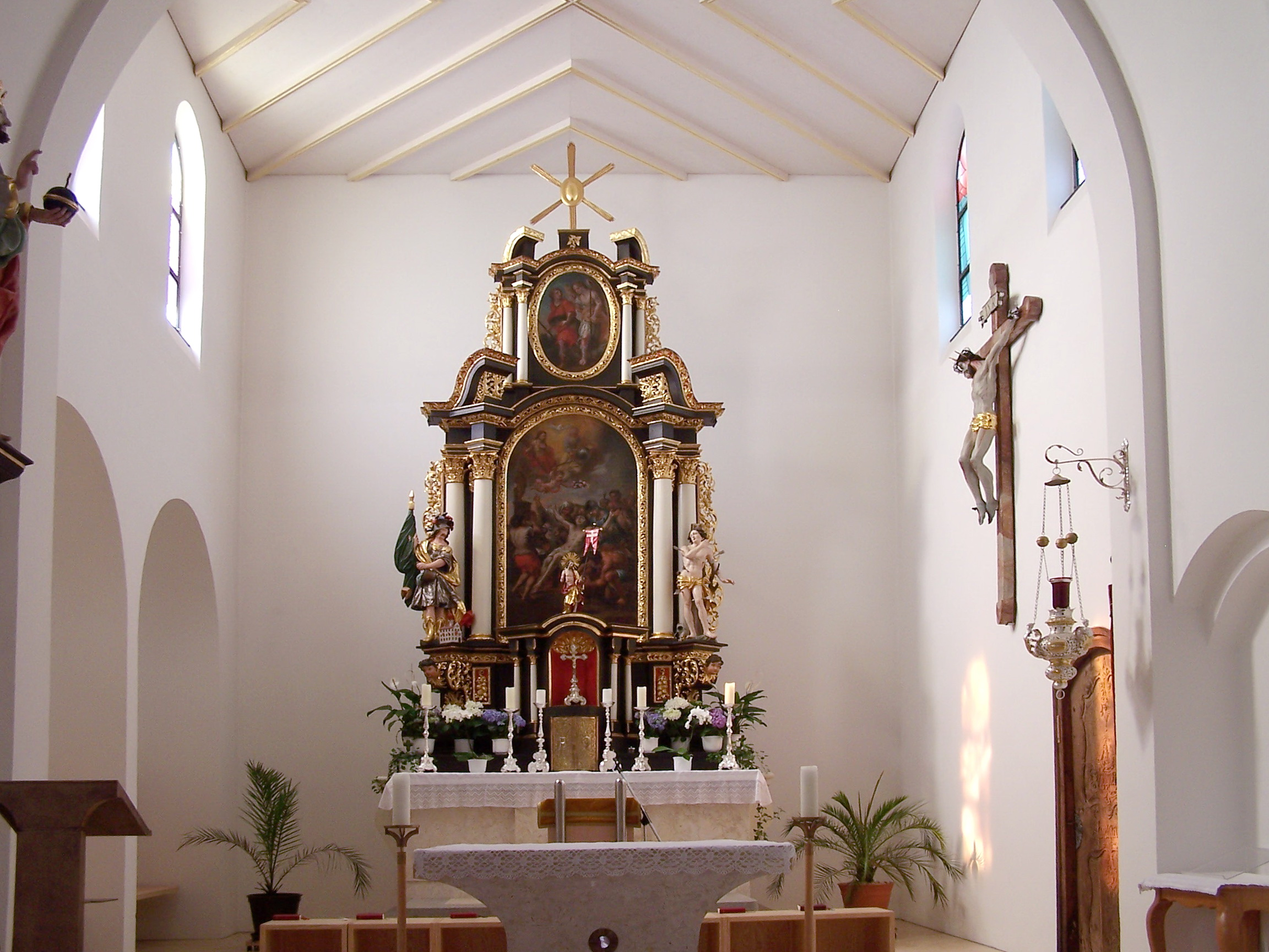 Wörth an der Isar. Landshuter Straße 55. Katholische Pfarrkirche St. Laurentius. Flach gedeckter Chorraum mit barockem Hochaltar.